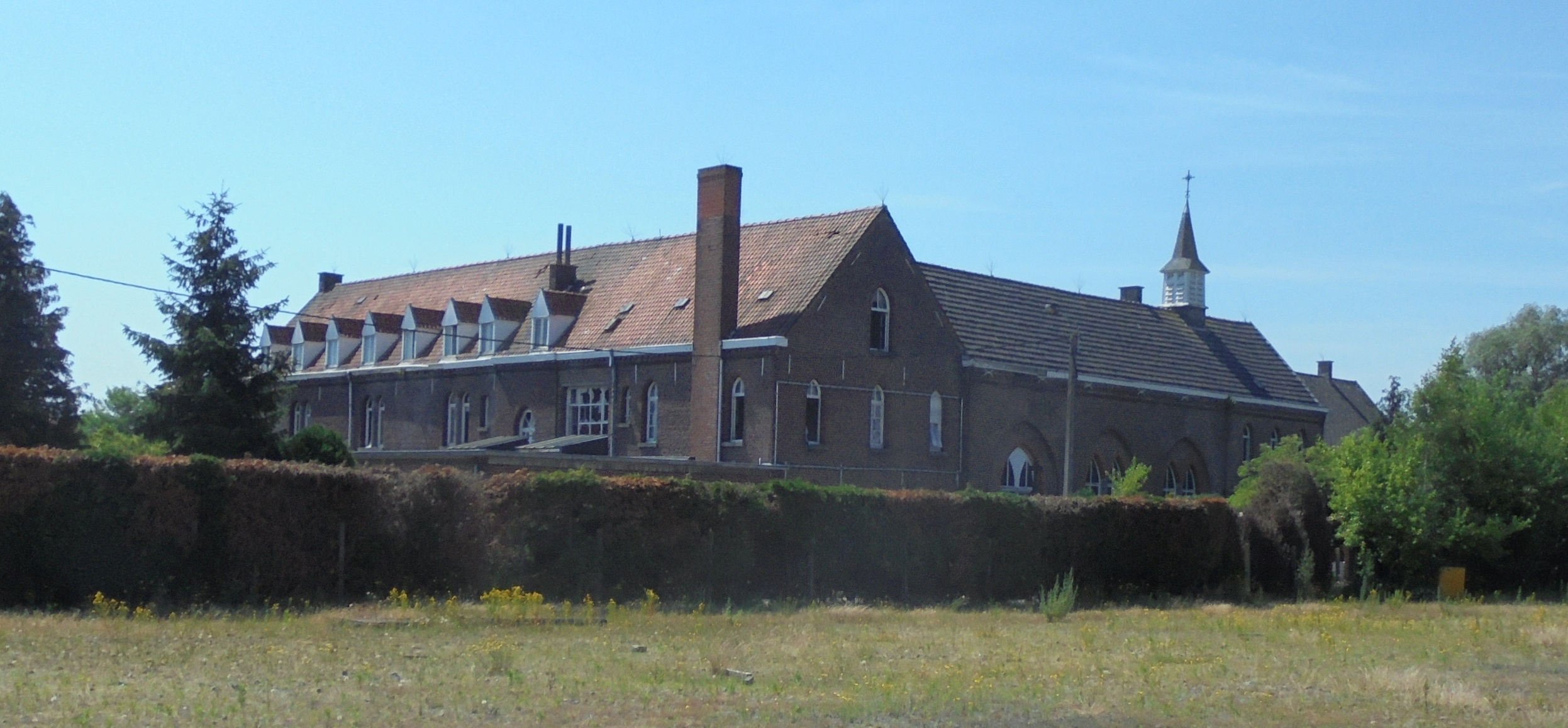 Slotklooster van de Passionistinen Mater Dolorosa - Blekerijstraat - Tielt - West-Vlaanderen - België